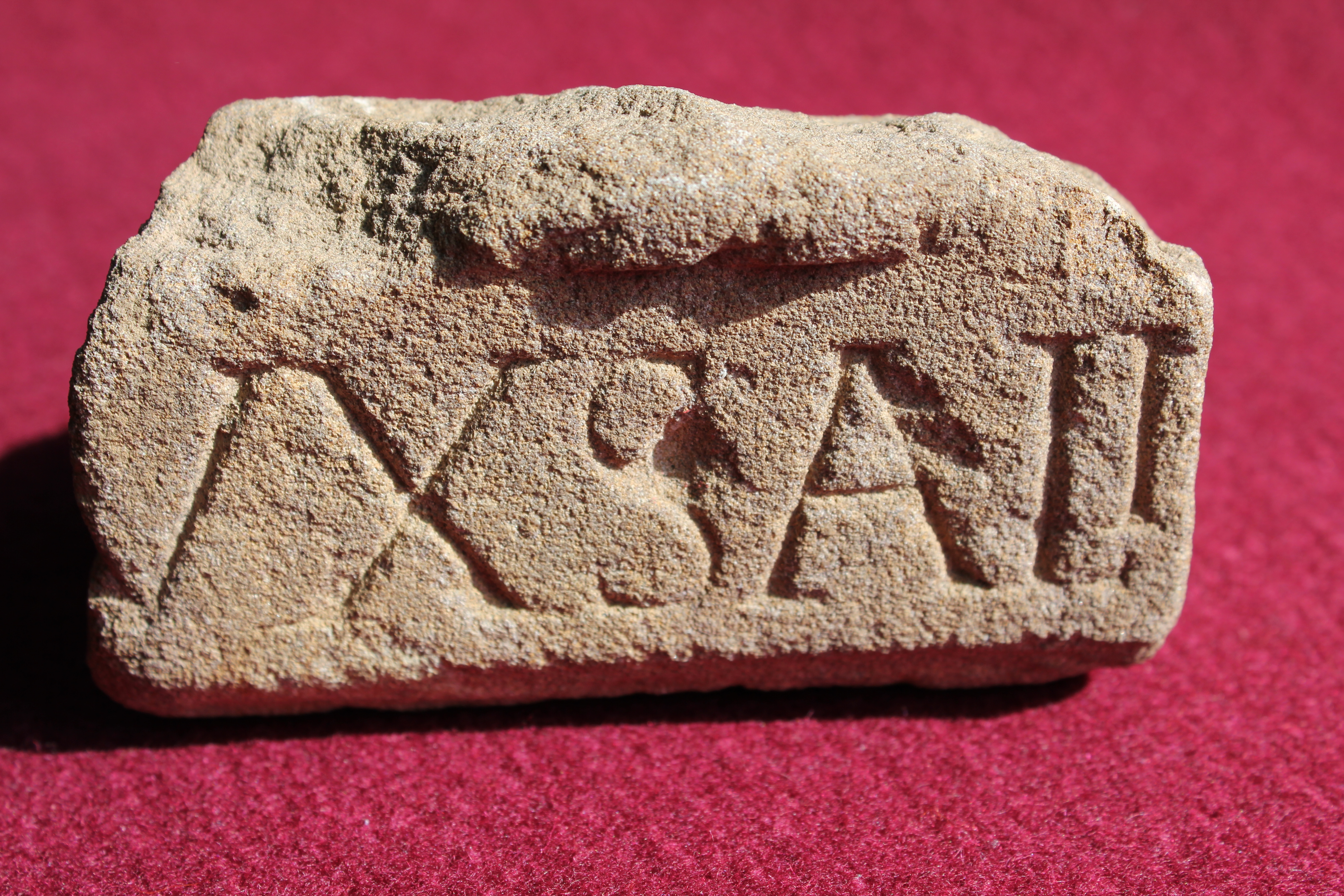 Das Bild zeigt eine 1962 im gallo-römischen Tempelbezirk Varnenum in Aachen-Kornelimünster gefundene Inschrift. Der Name weist auf die Stammesgöttin der westgermanischen Sunuker.